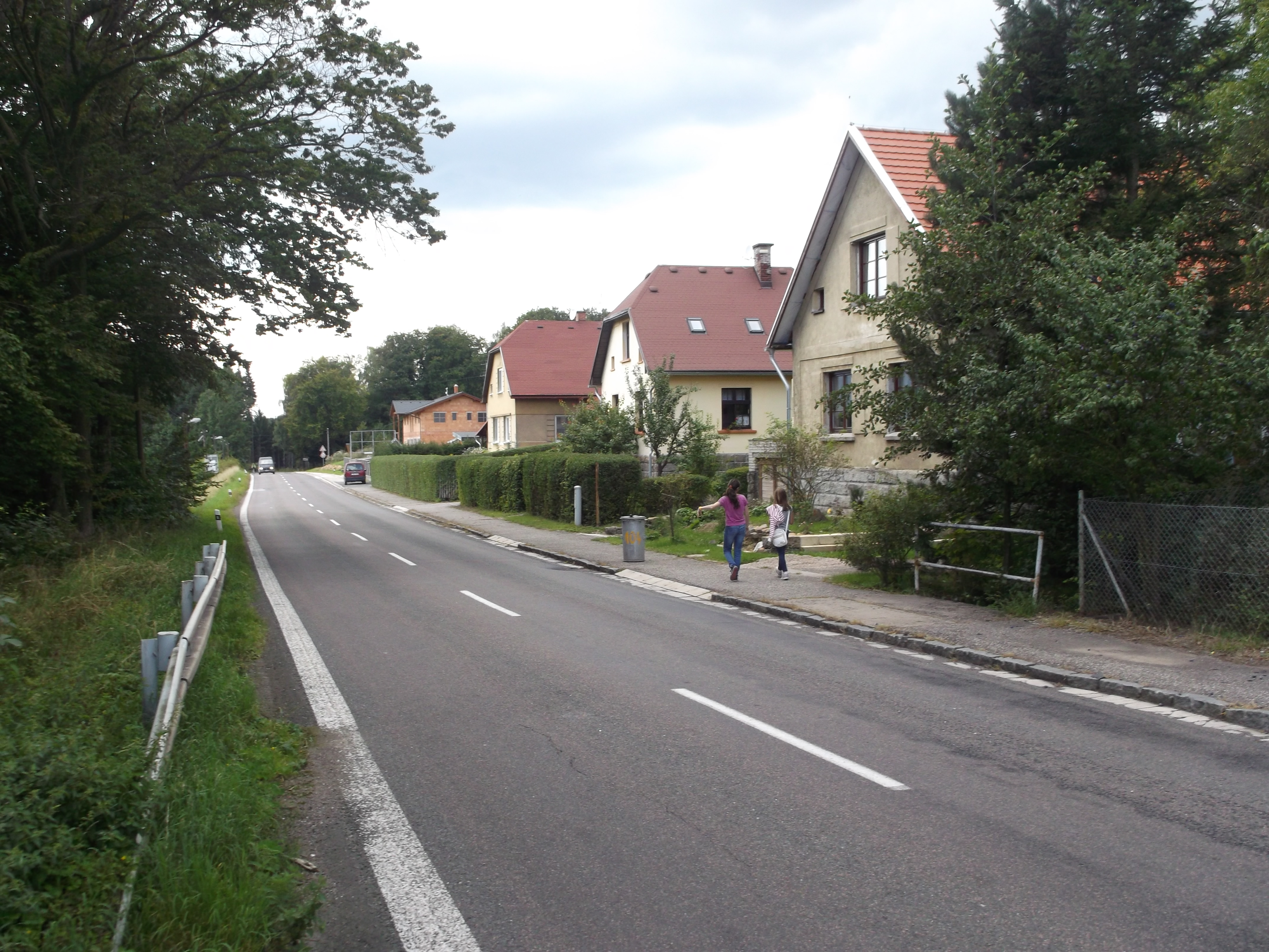 Dolní Nemojov - západní část